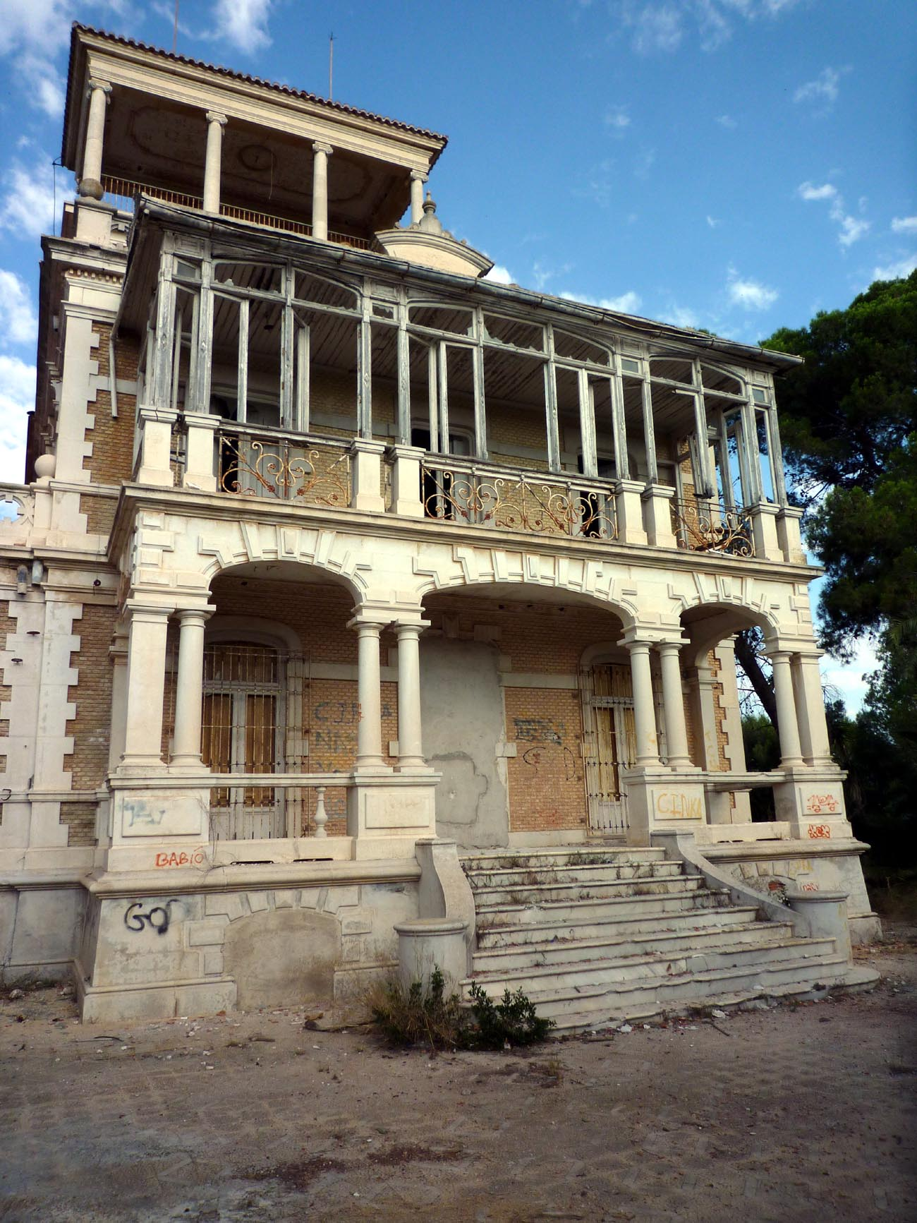 Villa Calamari. Palacete modernista en ruinas del arquitecto Víctor Beltrí en Cartagena (España).